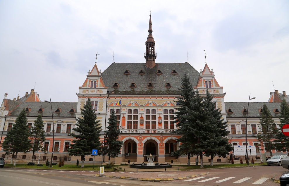 Városháza, (Polgármesteri Hivatal) Déva